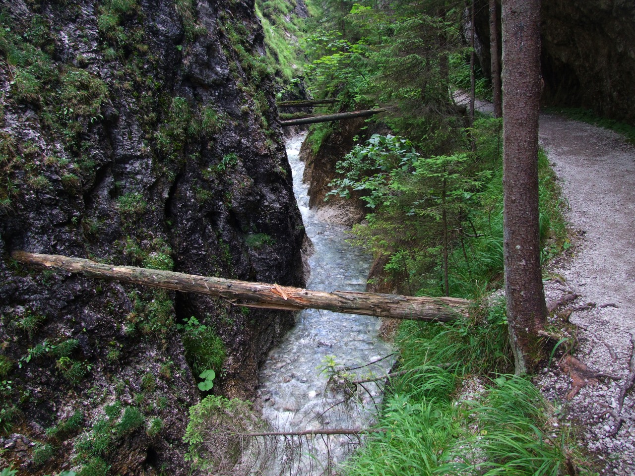 Wąwóz Cieśniawa w Dolinie Juraniowej w słowackich Tatrach Zachodnich